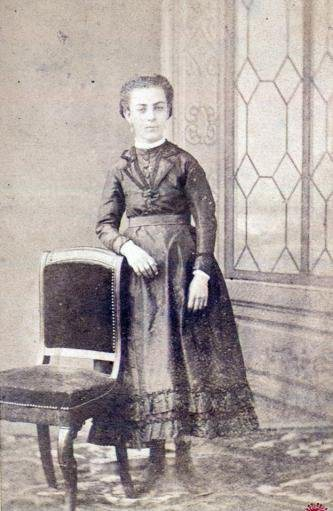 Jeanne Rosalie Vitalie Rimbaud (1858-1875), sœur cadette de Jean Nicolas Arthur Rimbaud, sœur aînée d' Isabelle Rimbaud- Berrichond et fille de Vitalie Rimbaud-Cuif